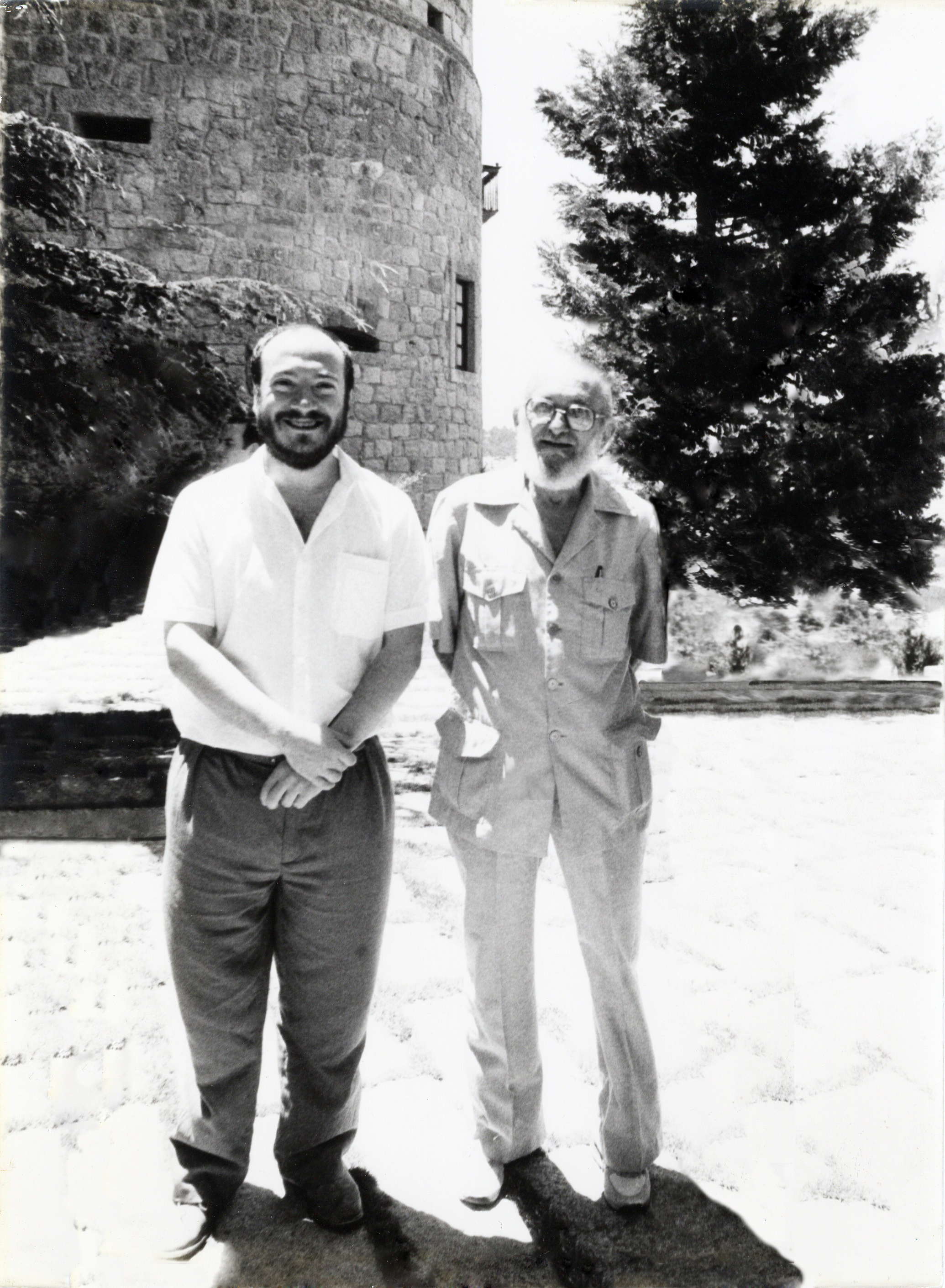 Dos grans amics, Daniel Jover i Paulo Freire